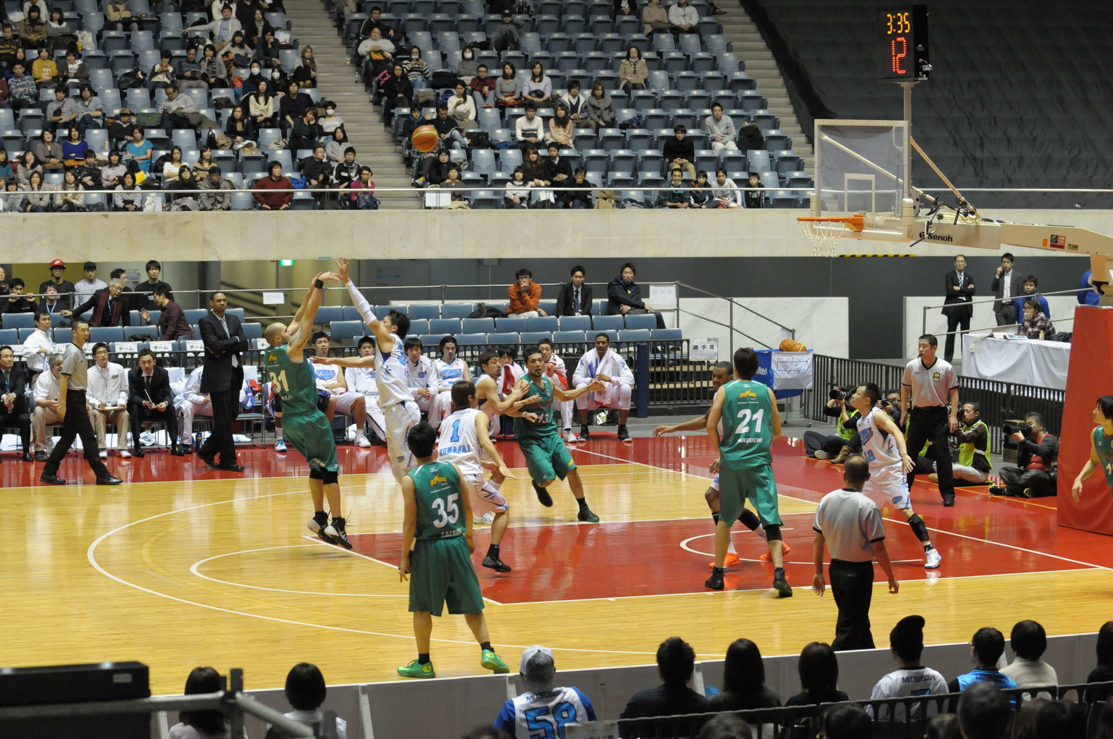 2014年全日本総合バスケットボール選手権大会準々決勝、三菱電機ダイヤモンドドルフィンズ名古屋対トヨタ自動車アルバルク東京。代々木第一体育館で。